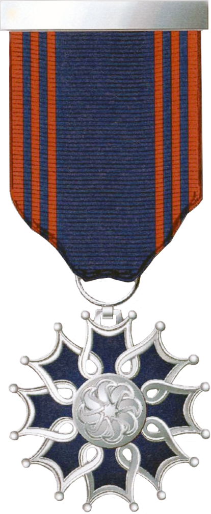 Azərbaycan Respublikası fəxri adlarının siyahıları